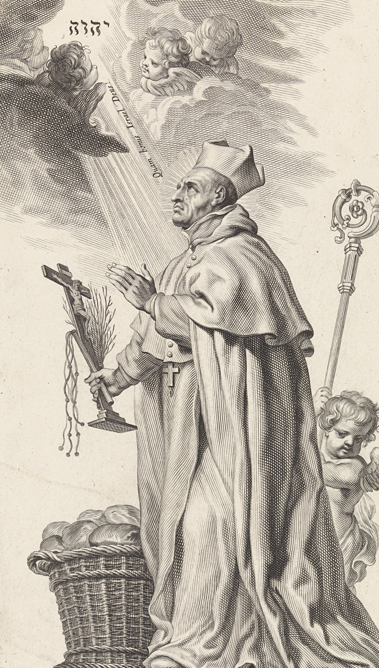 Der heilige Siard von Mariengaarde